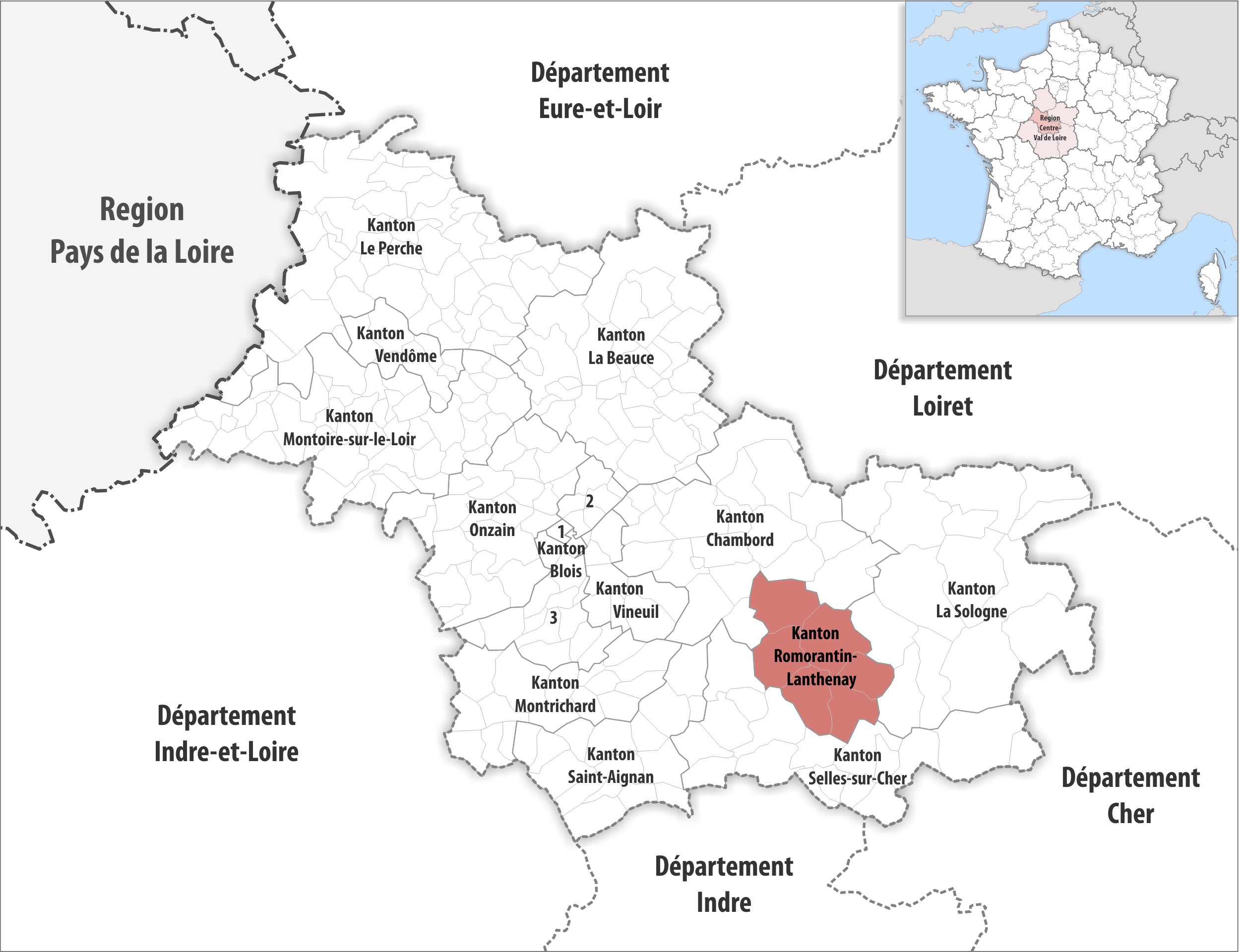 Lage des Kantons Romorantin-Lanthenay